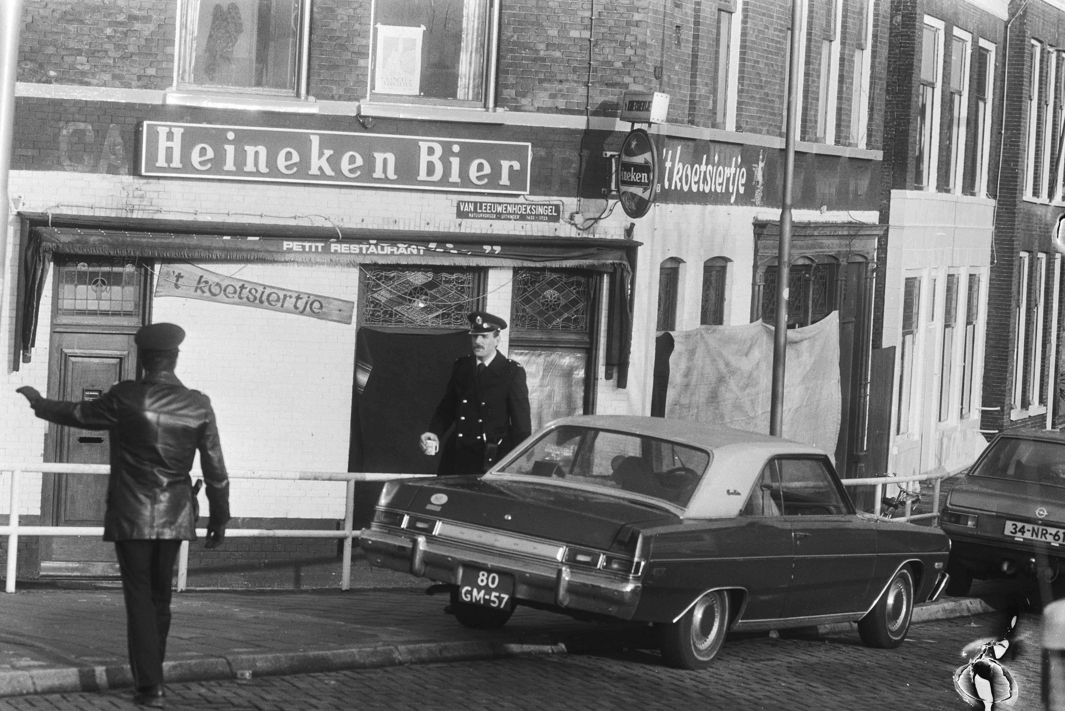 Collectie / Archief : Fotocollectie Anefo Reportage / Serie : Politiebewaking bij cafe 't Koetsiertje in Delft waar een schietpartij plaatsvond door Cevdet Yilmaz, waarbij zes mensen om het leven kwamen Beschrijving : cafés, schietpartijen, politie, bewaking Datum : 6 april 1983 Locatie : Delft, Zuid-Holland Trefwoorden : bewaking, cafés, politie, schietpartijen Fotograaf : Bogaerts, Rob / Anefo Auteursrechthebbende : Nationaal Archief Materiaalsoort : Negatief (zwart/wit) Nummer archiefinventaris : bekijk toegang 2.24.01.05 Bestanddeelnummer : 932-5535